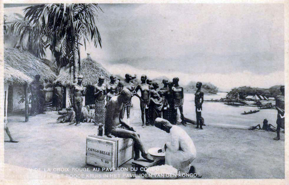 Exposition Universelle de 1935 Section de la Croix Rouge au Pavillon du Congo.